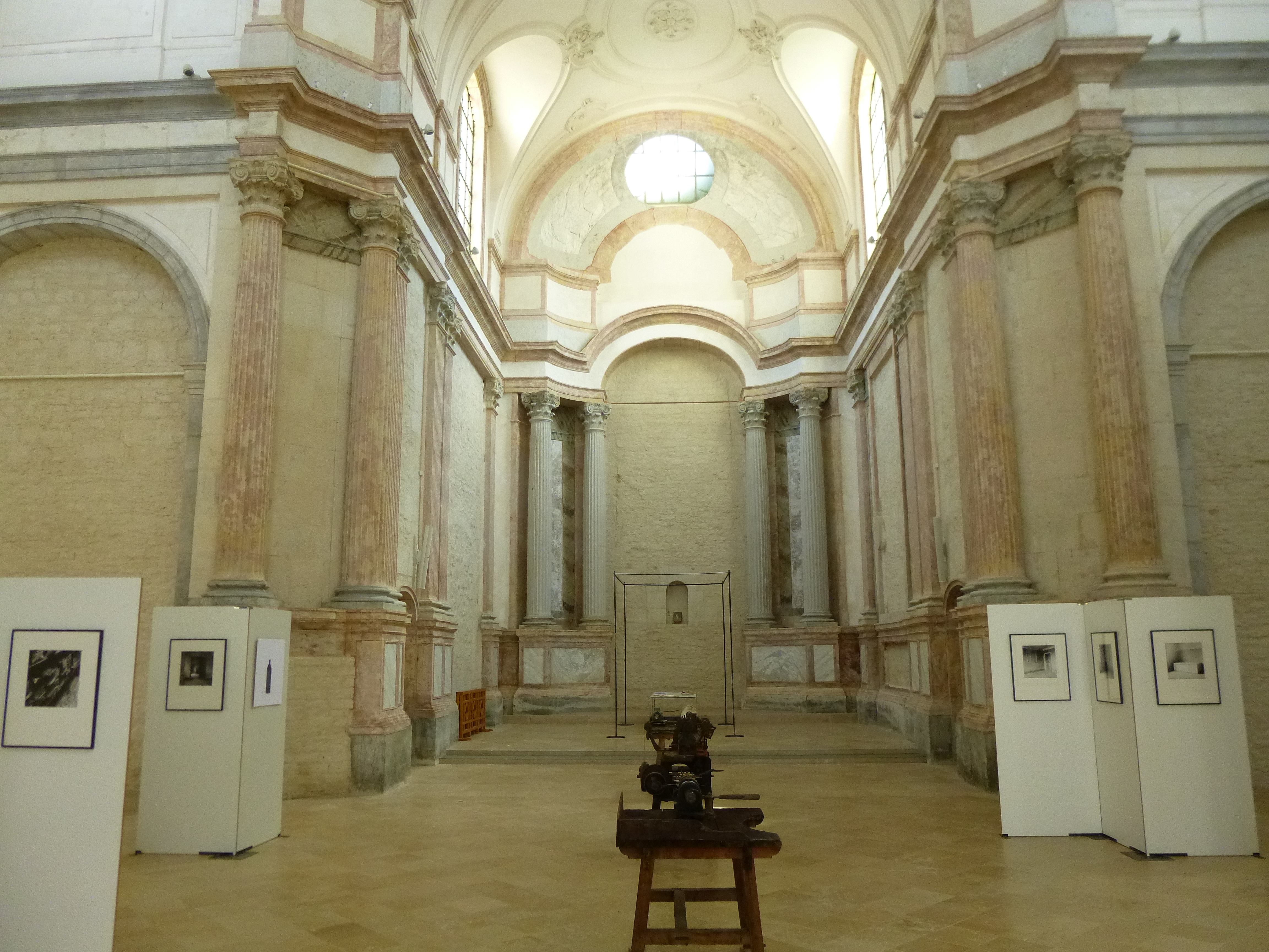 vue du chevet et du transept droit de l'abbaye Sainte-Odile à Baume-les-Dames